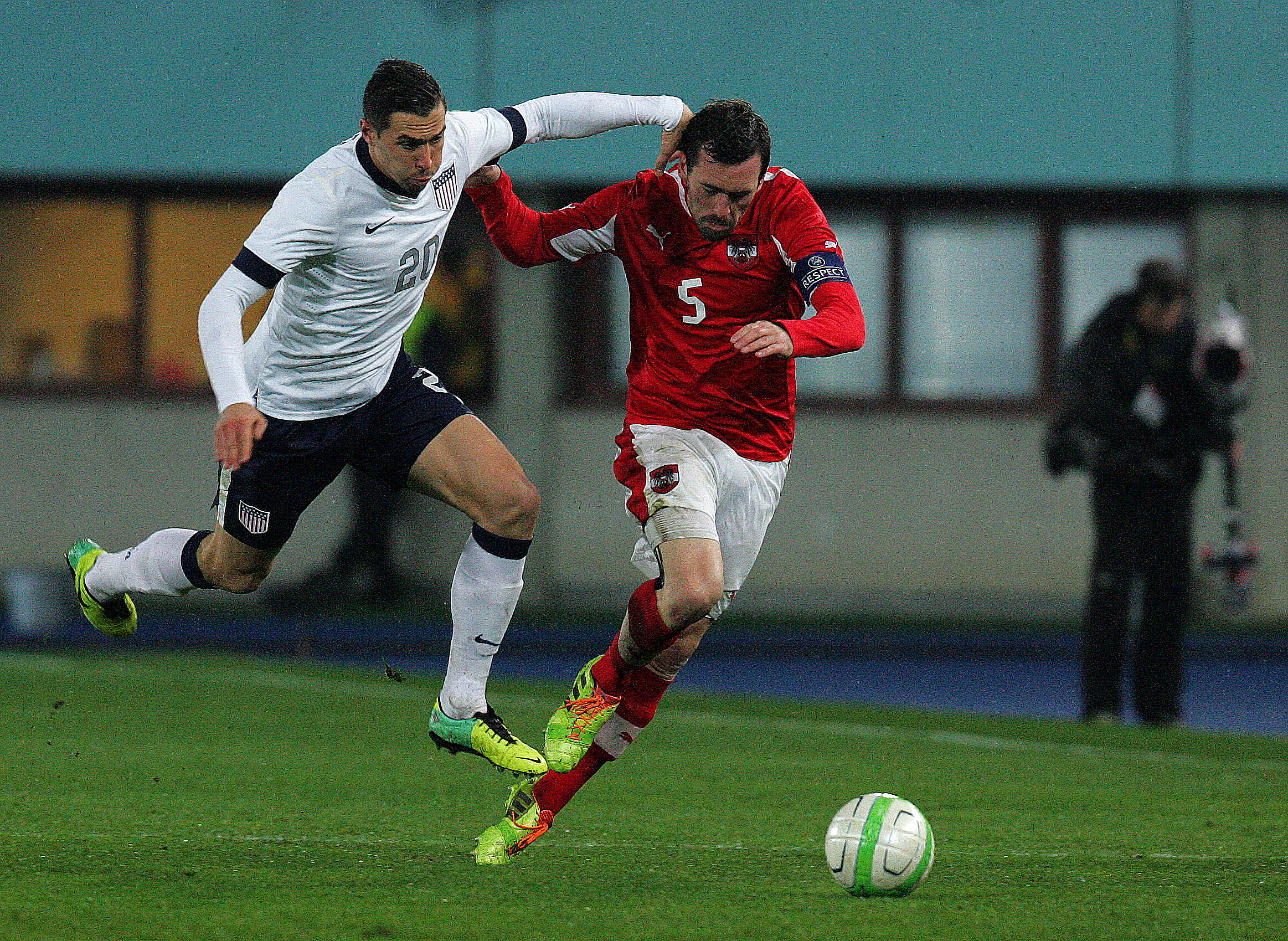 Freundschaftliches Länderspiel Österreich - USA 19.11.2013 in Wien: Geoff Cameron, Christian Fuchs